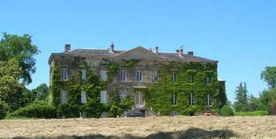 Château du Mazeau (site internet